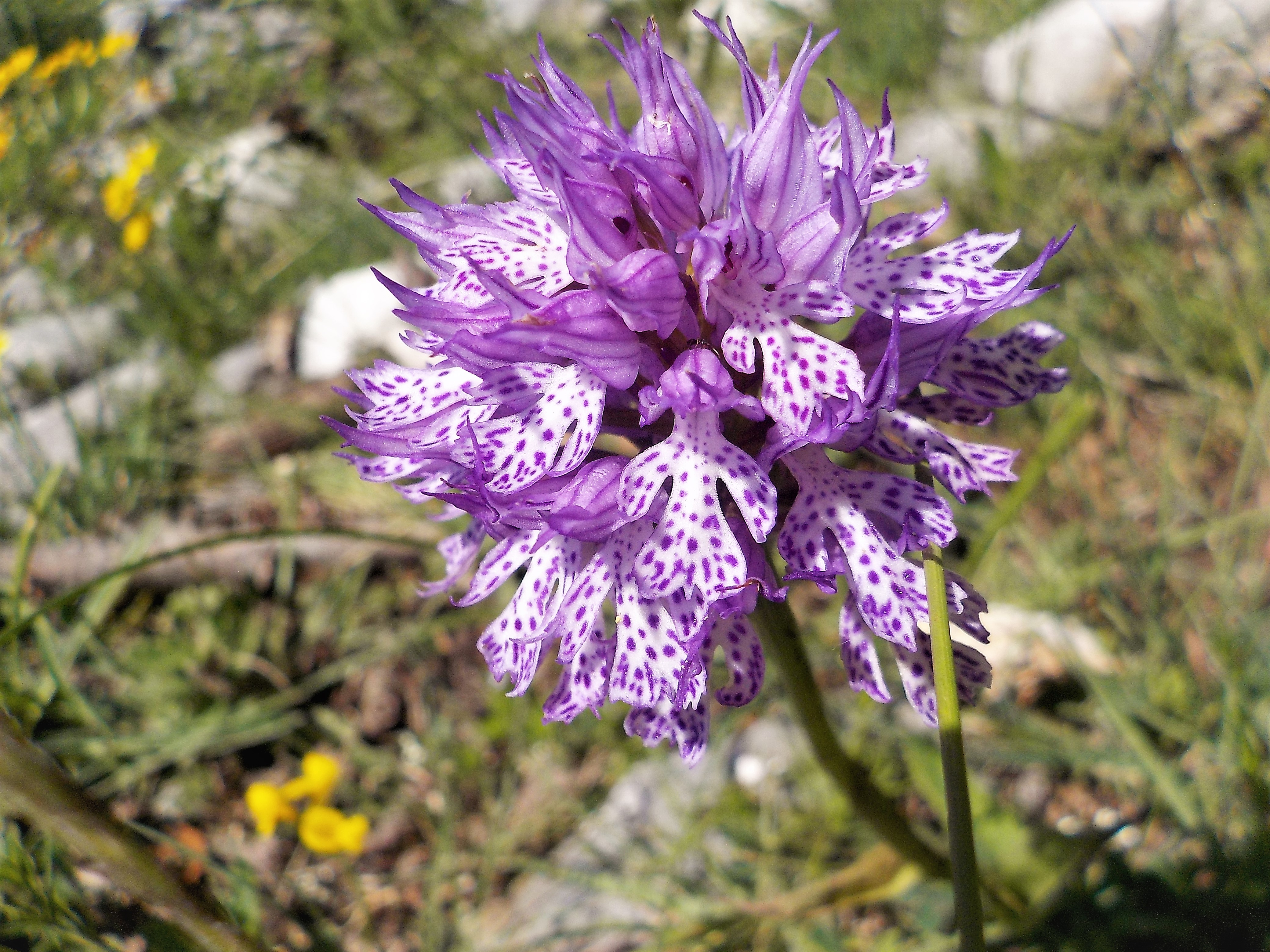 parco naturale regionale Monti Simbruini (Q3895675)